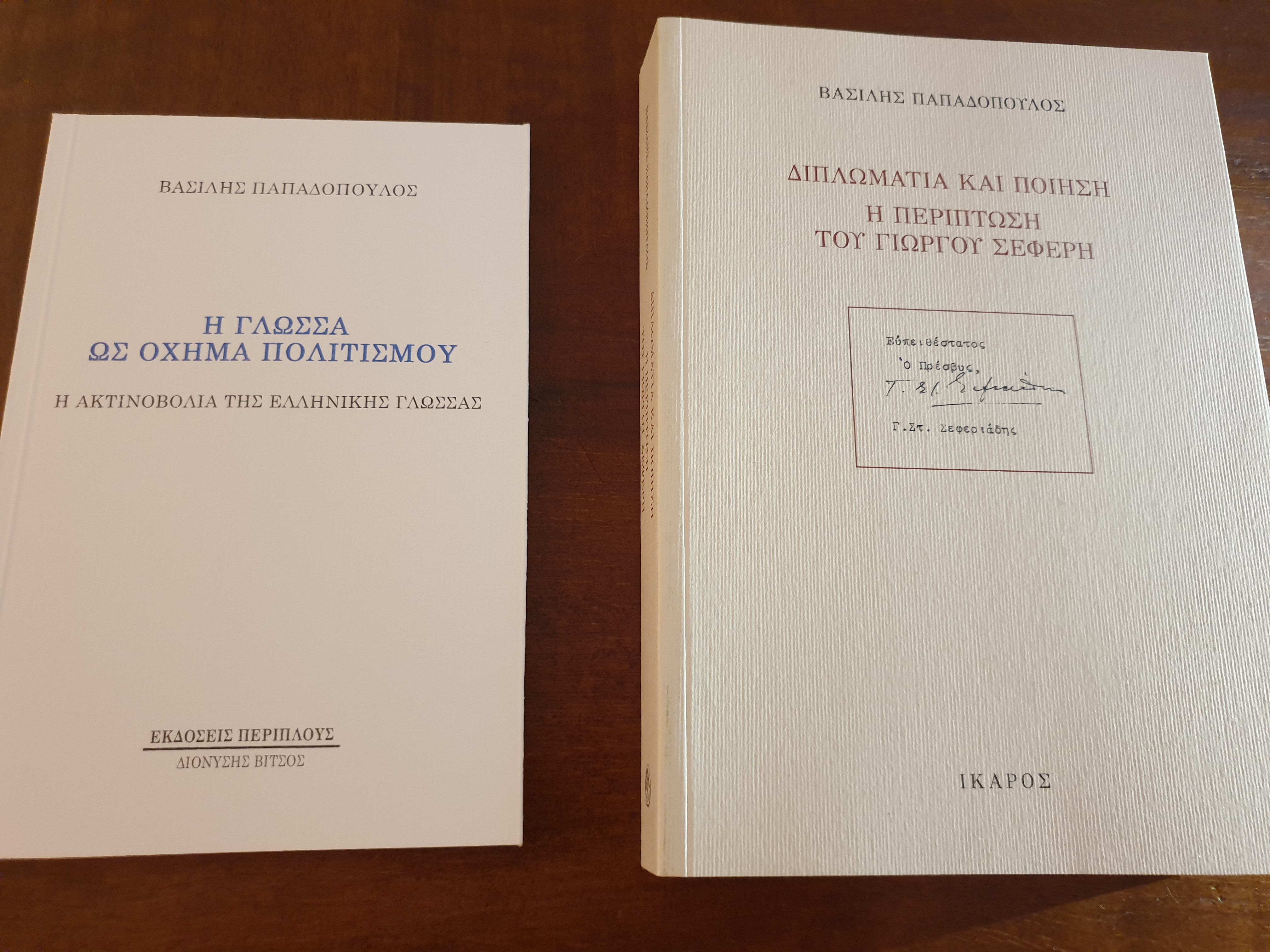 "Η γλώσσα ως όχημα πολιτισμού. Η ακτινοβολία της Ελληνικής γλώσσας", Βασίλης Παπαδόπουλος , 2019 , εκδόσεις Περίπλους & "Διπλωματία και Ποίηση , η περίπτωση του Γιώργου Σεφέρη" , Βασίλης Παπαδόπουλος , 2019, εκδόσεις Ίκαρος.